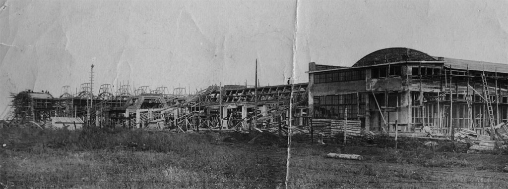 Cтроительство Моторного завода в селе Богородское около Уфы, Россия